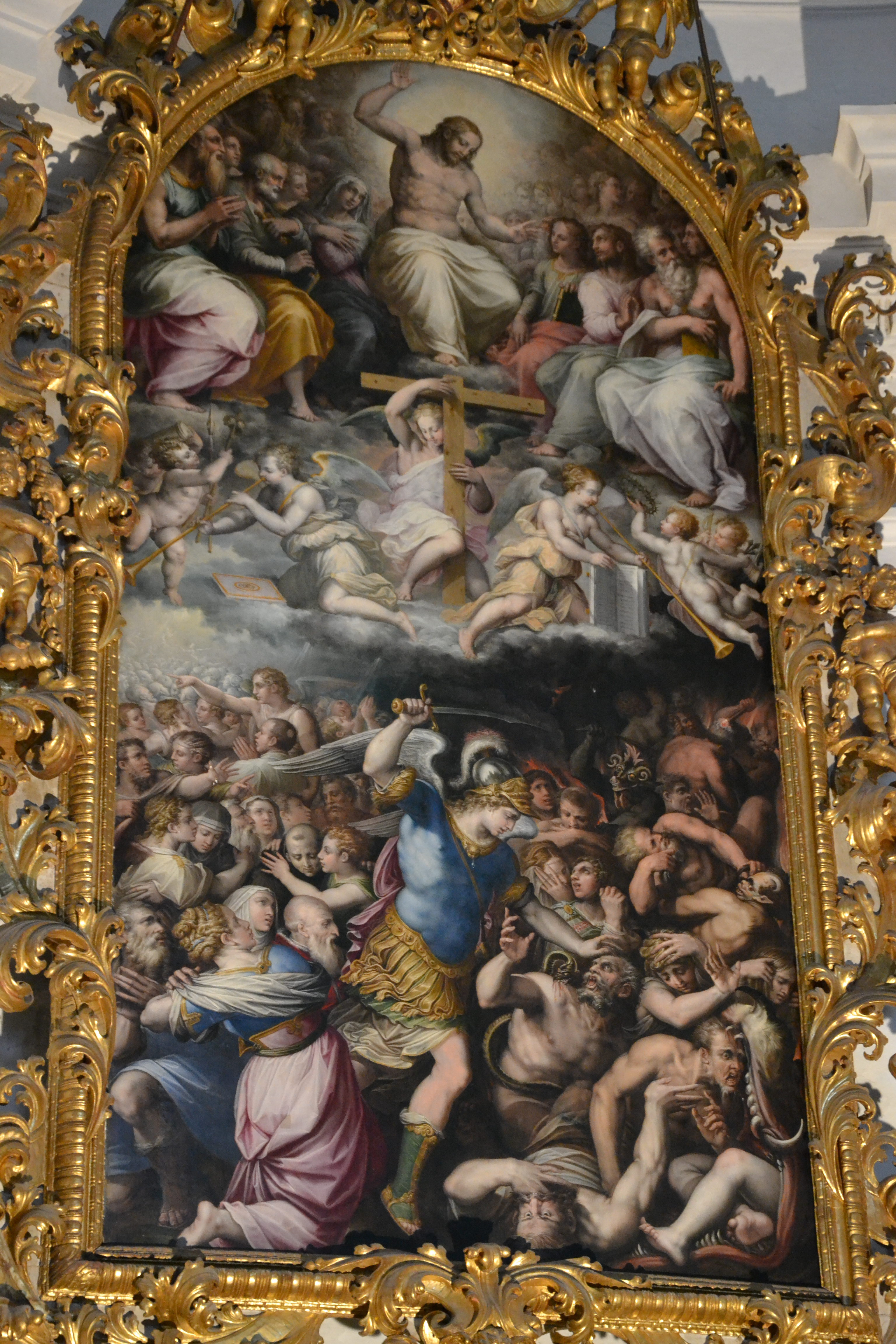 convento domenicano di Santa Croce a Bosco Marengo (AL) realizzato per volontà di papa Pio V nella seconda metà del sec. XVI, nel 1862 divenne riformatorio giovanile fino al 1989. Altare progettato da Giorgio Vasari nel 1569 a Firenze con pittori della sua bottega tra cui Francesco Morandini detto “Il Poppi”, Jacopo Zucchi e Giovanni Battista Naldini